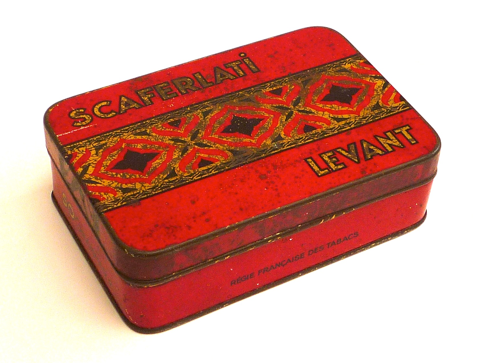 Boîte de tabac Scaferlati Levant de la Régie française des Tabacs